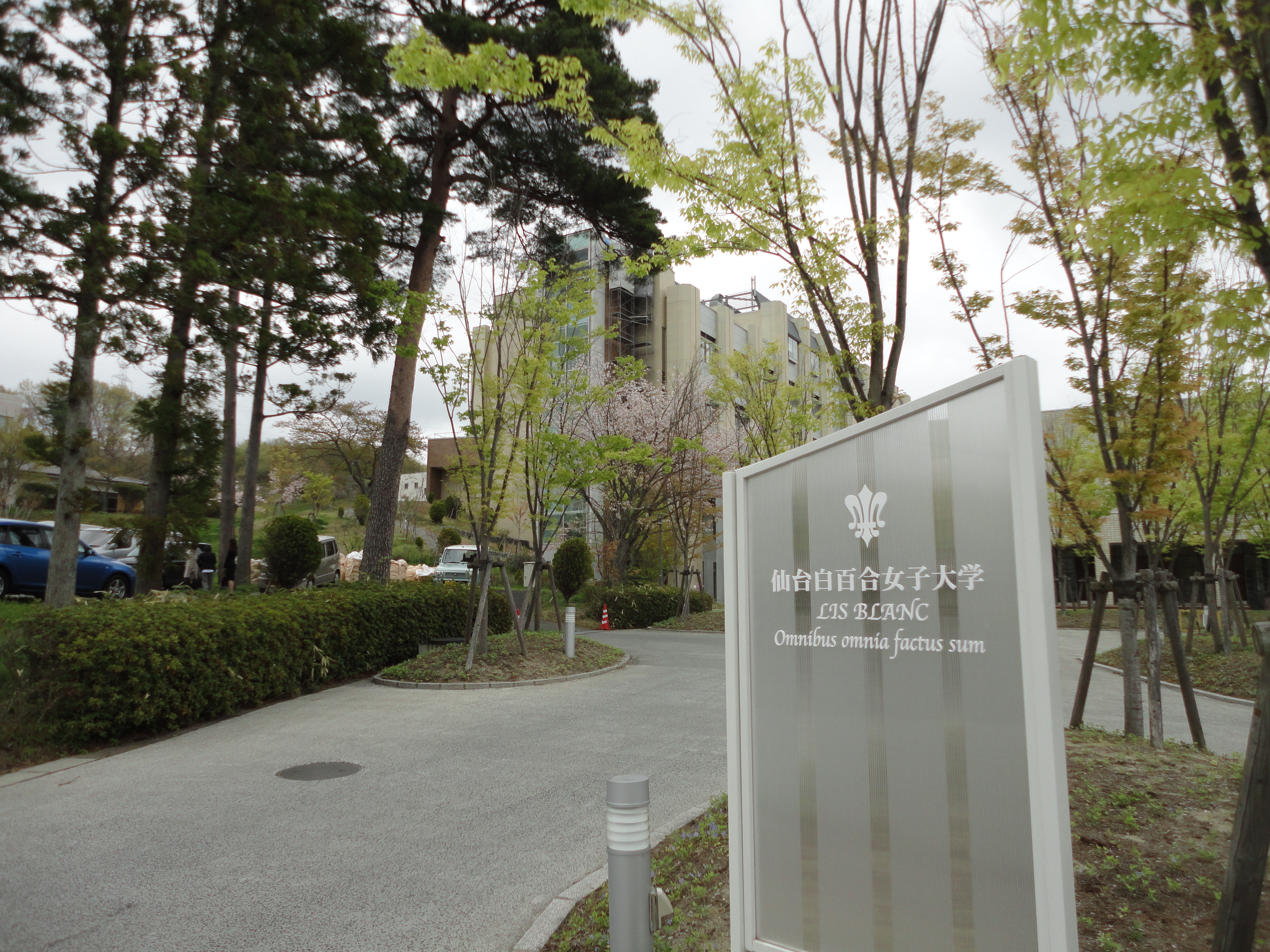 2011／春